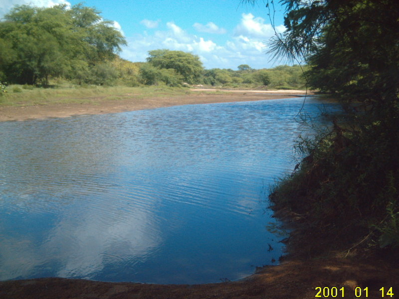 Riacho salgado em Pitombeira, São Paulo do Potengi